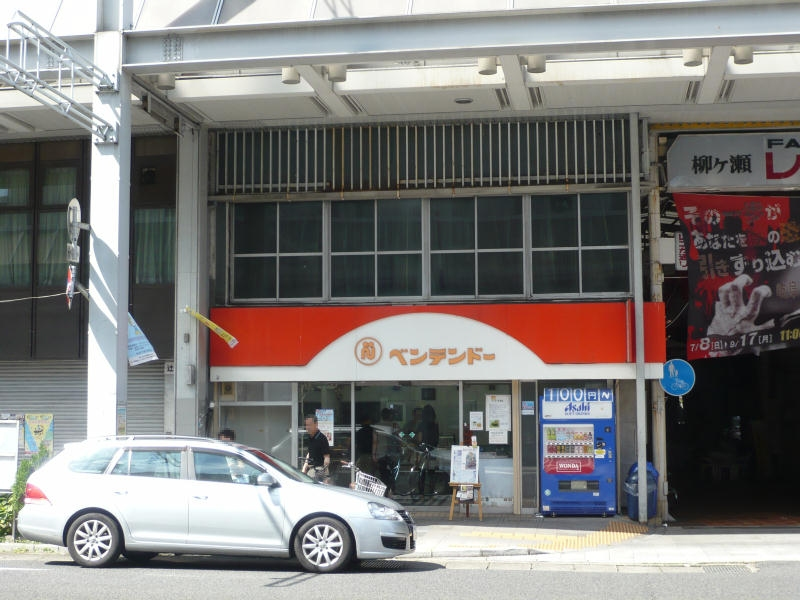 岐阜市柳ヶ瀬、ベンテンドー。